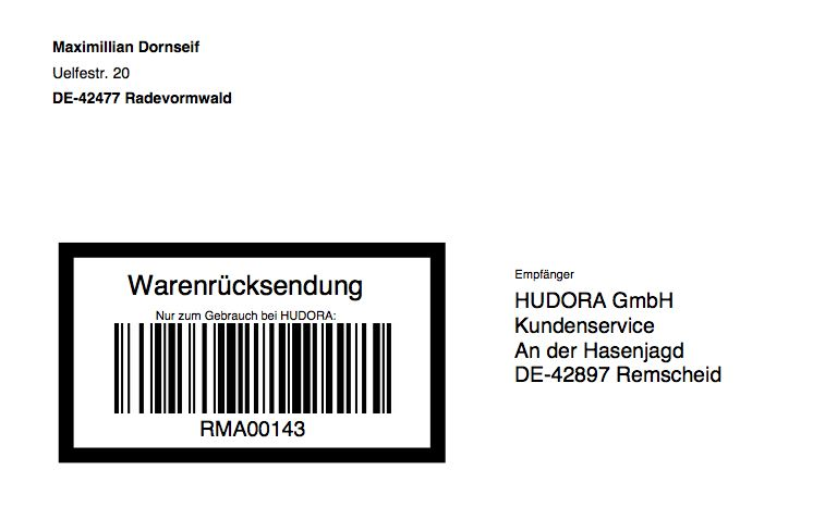 Typischer RMA-Beleg, wie er einer Retoure beigelegt wird.